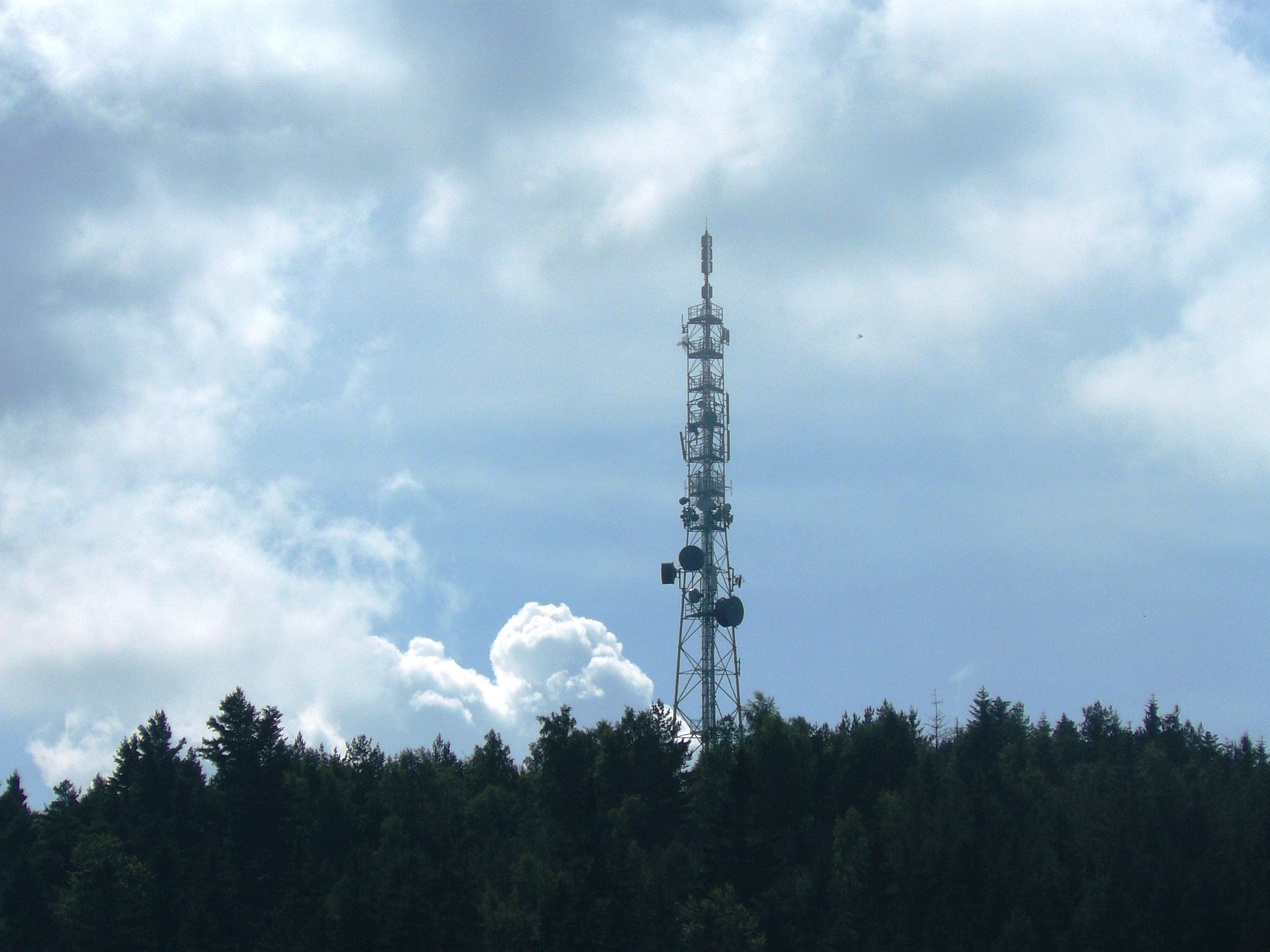 Pylonne d'antenne émettrice de Télédiffusion de France au rocher du Coucou, Bas-Rhin (67)